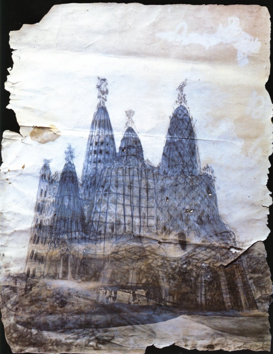 Proyecto de iglesia de la Colonia Güell, Antoni Gaudí (1908-1915)